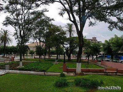 jardim This is an image of music and dance from Angola